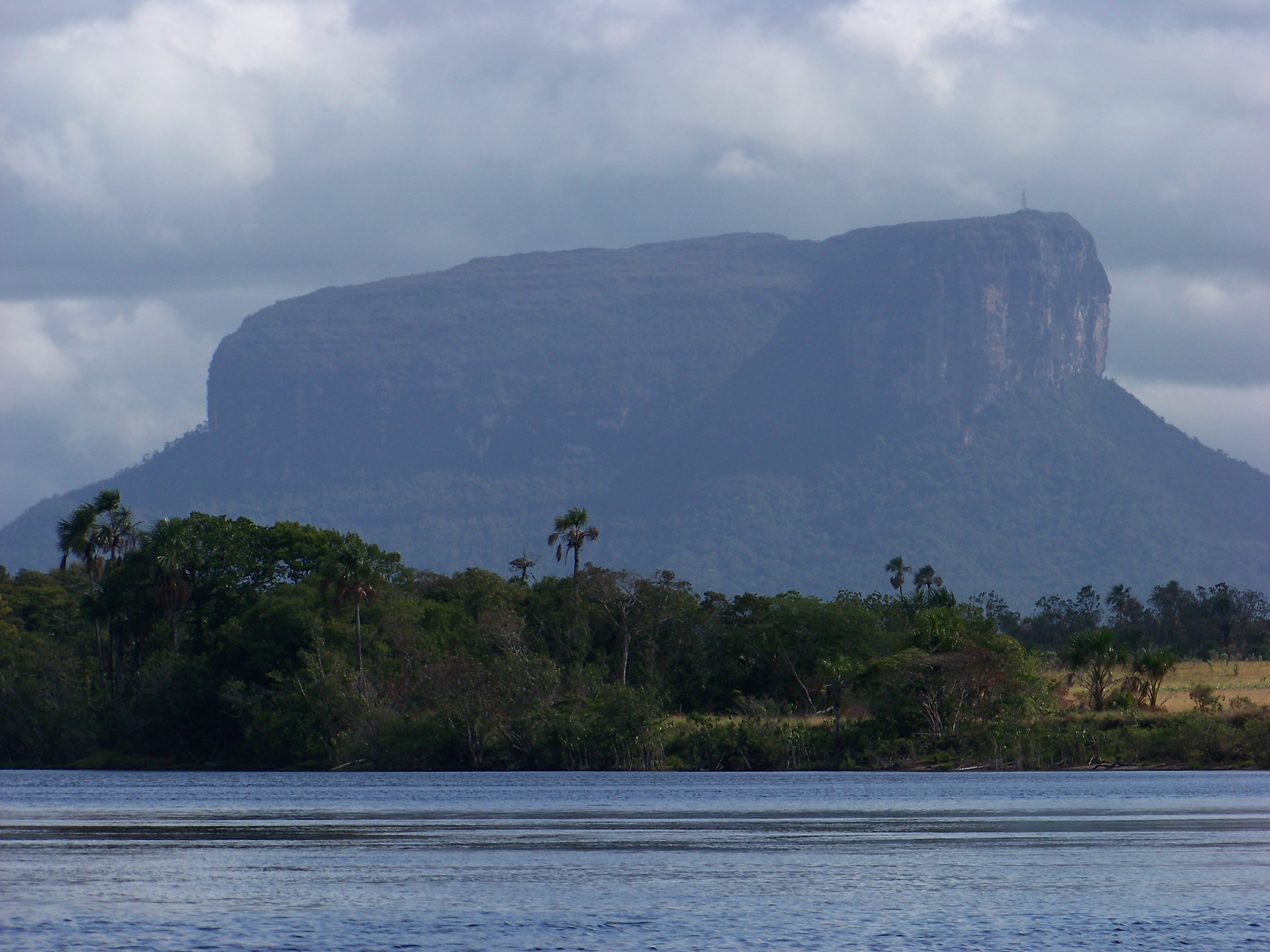 Canaima, Edo Bolívar